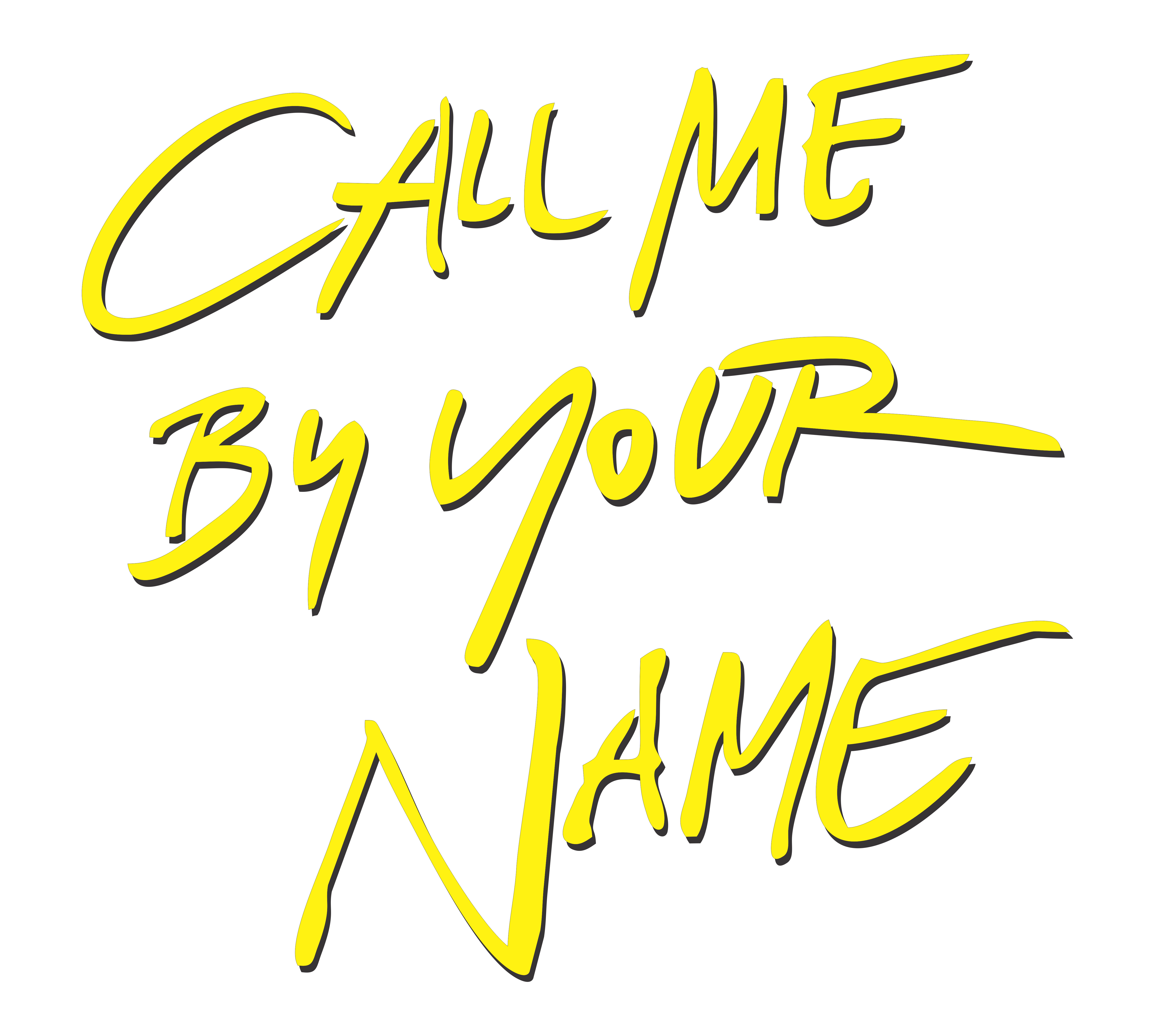 Logotipo de la cinta "Call Me By Your Name" de 2017.